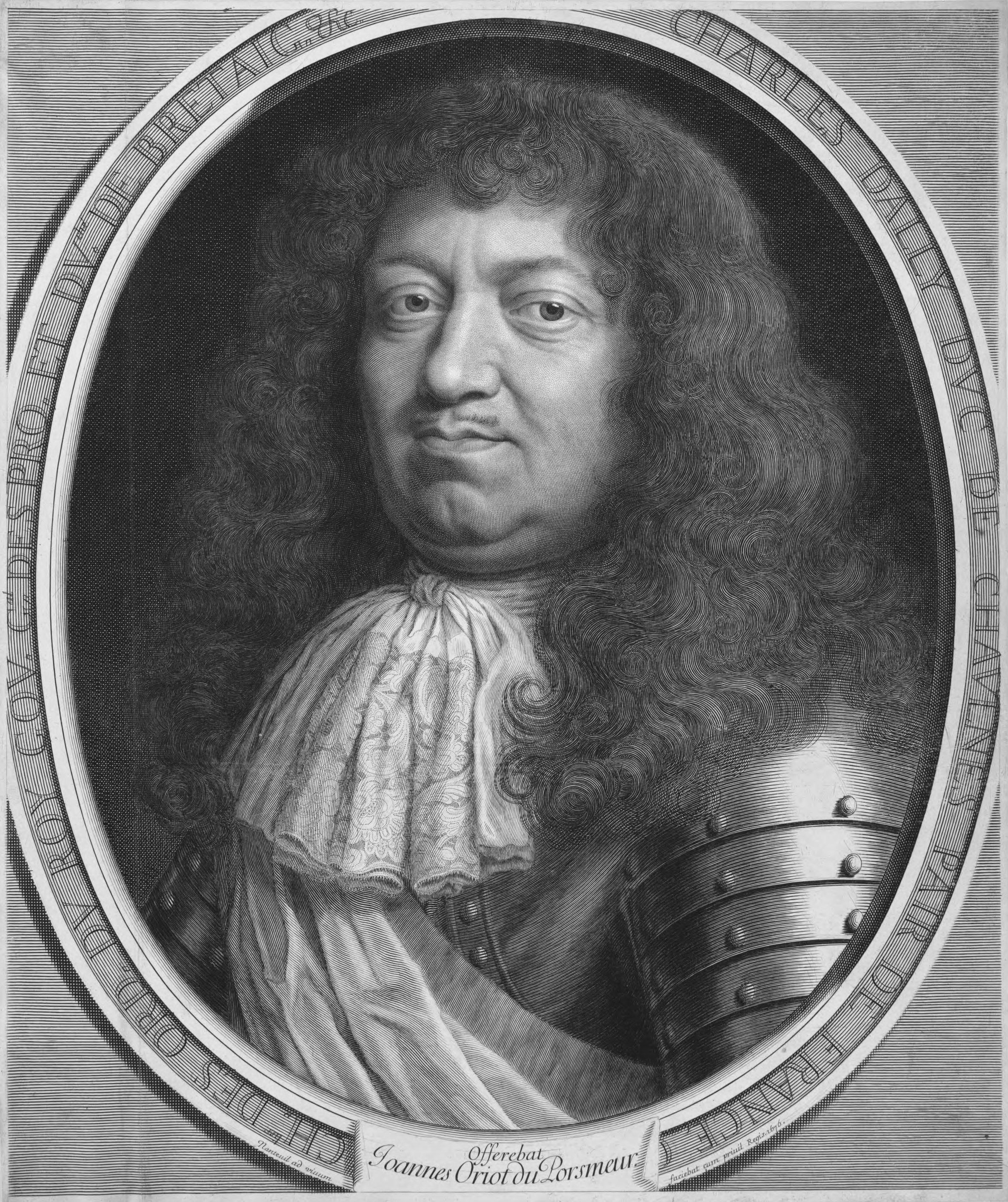 Porträt Charles d'Albert d'Ailly, Herzog von Chaulnes (1625-1698), Führer der Strafaktion des Sonnenkönigs Ludwig XIV. anläßlich der bretonischen Bauernrevolte Révolte du papier timbré, genannt "fettes Schwein"